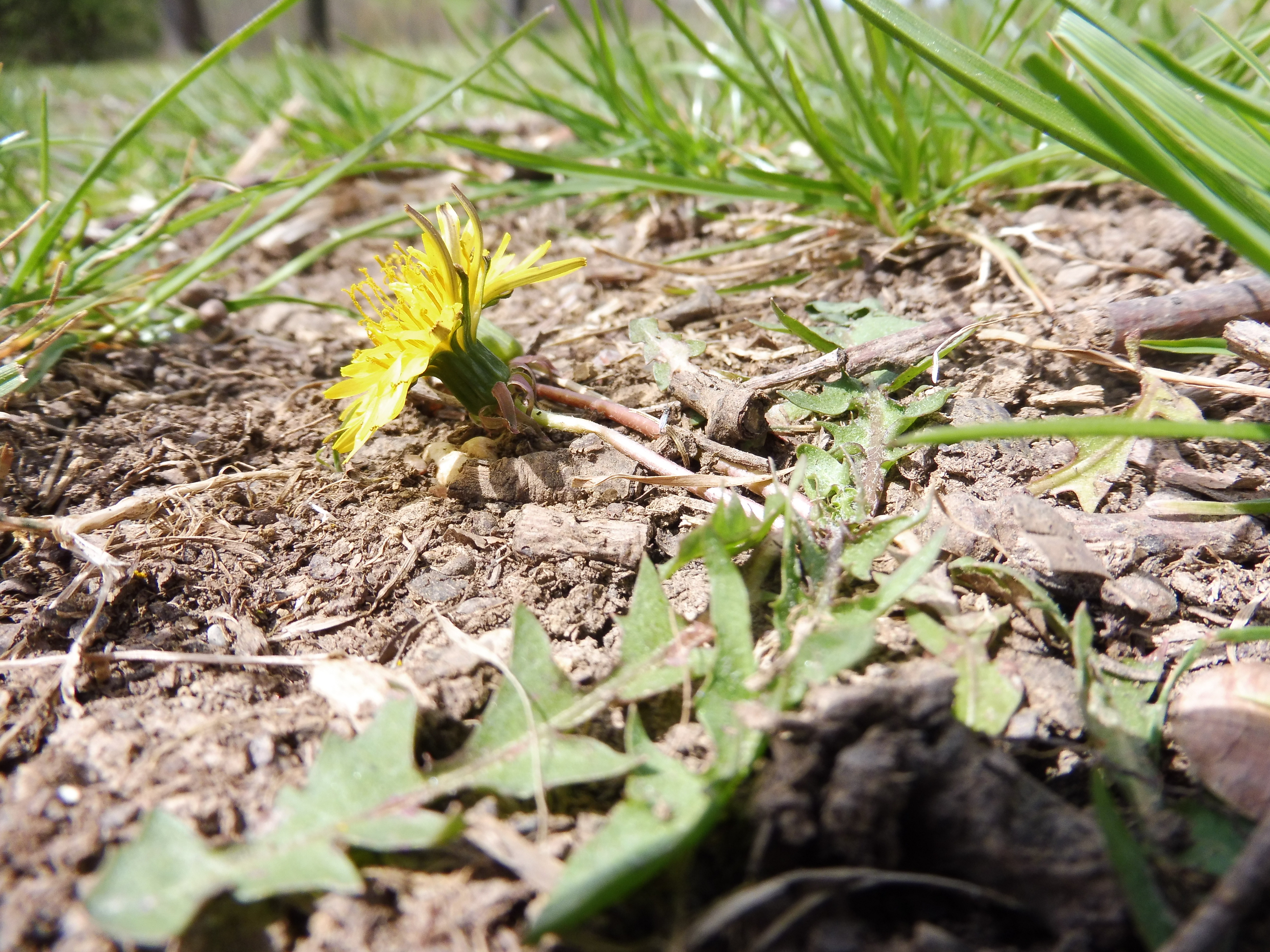 Pflaumenfarbener Löwenzahn (Taraxacum bellicum) Eichenhain Stuttgart-Riedenberg 14. April 2018